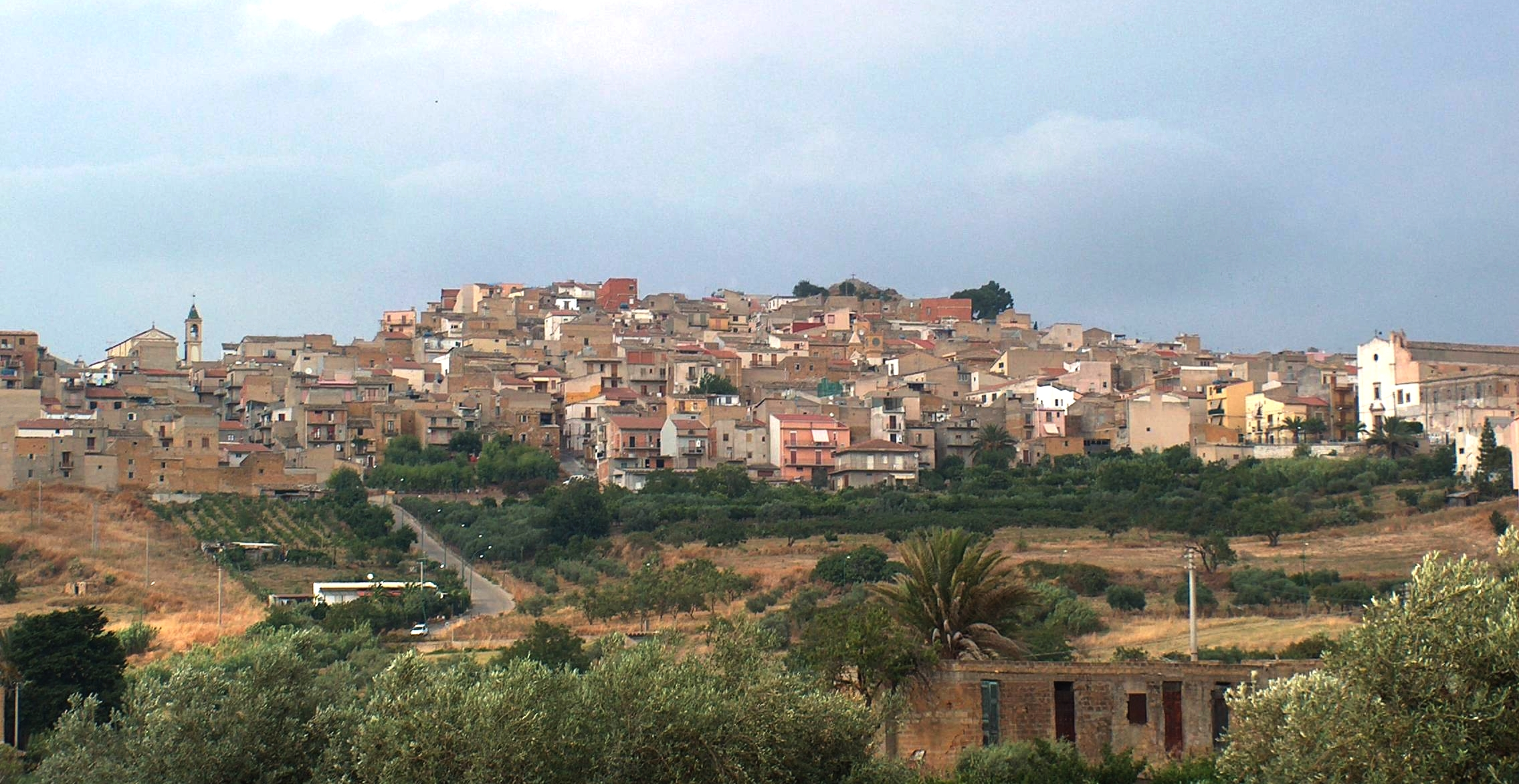 Panorama di Cianciana, Sicilia